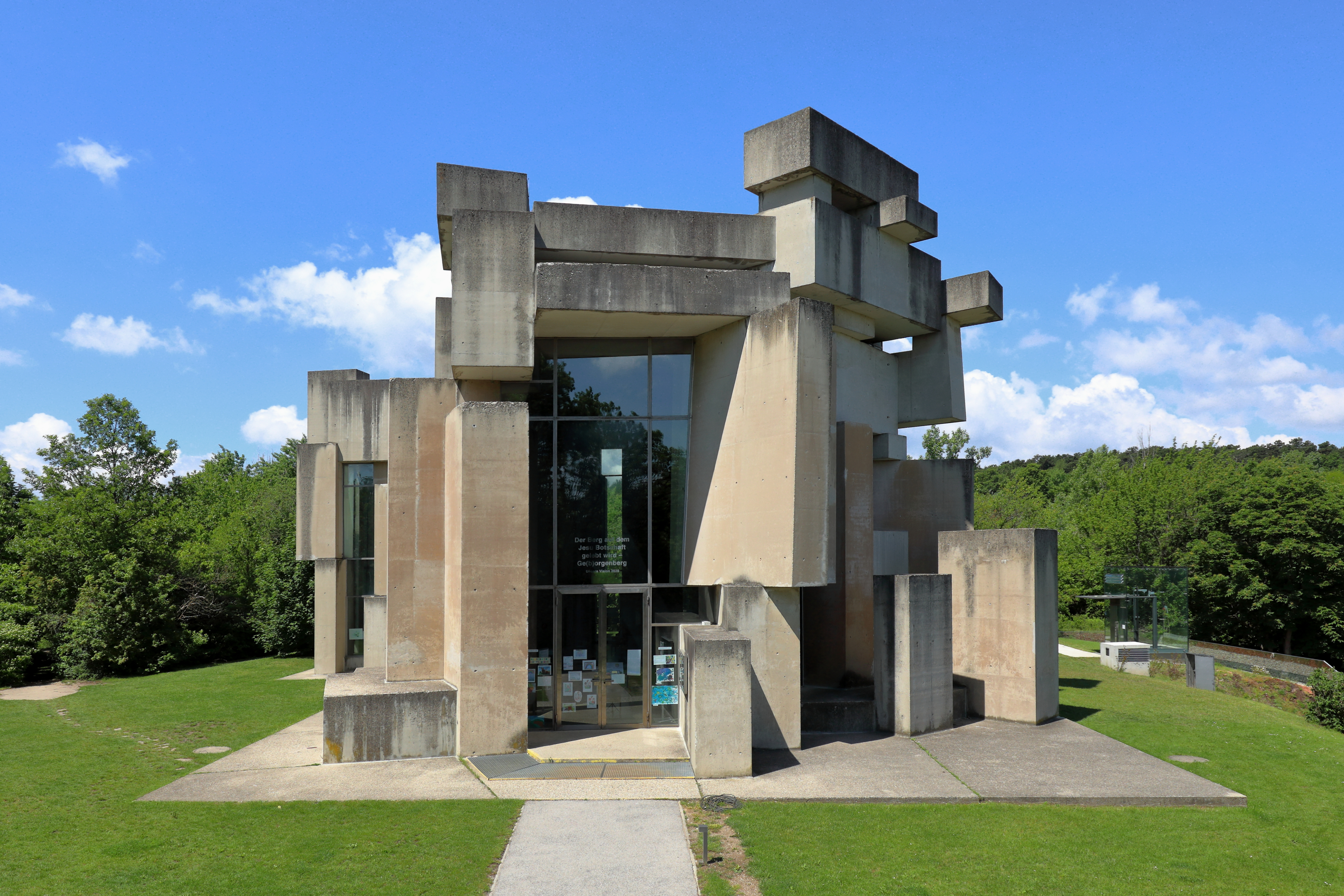 Ostansicht der Wotruba- bzw. Dreifaltigkeitskirche auf dem Georgenberg im Wiener Stadtteil Mauer des 23. Gemeindebezirkes Liesing.Die Kirche im Stil des Brutalismus wurde auf Initiative von Margarethe Ottillinger (1919–1992) und nach einer Idee des Künstlers Fritz Wotruba (1907–1975) vom Architekten Fritz Gerhard Mayr (* 1931) errichtet. Der Entwurf für die Kirche (152 Betonblöcke mit einen Gesamtgewicht von über 4000 Tonnen, ohne Symmetrie aufeinander geschachtelt, mit schmalen, verschieden hohen Fensteröffnungen) wurde von Wotruba 1964 präsentiert. Wegen großem Widerstand konnte man erst 1974 mit dem Bau beginnen und zwei Jahre später, am 24. Oktober 1976, erfolgte die feierliche Einweihung durch Kardinal Franz König.